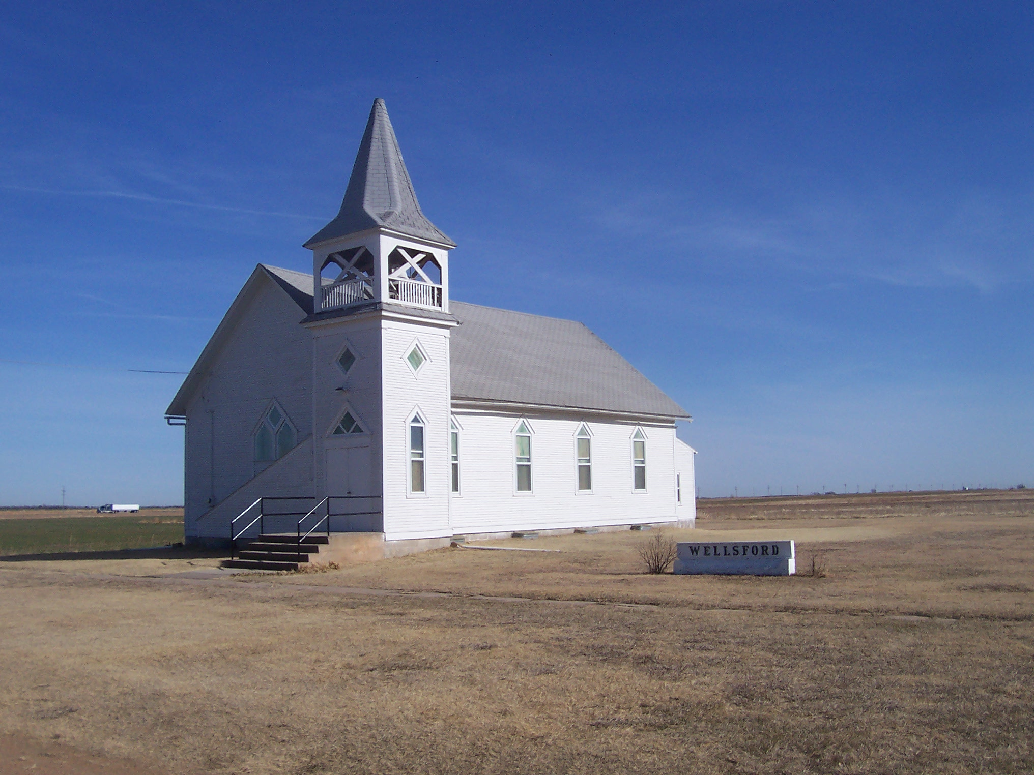 Wellsford, Kansas church